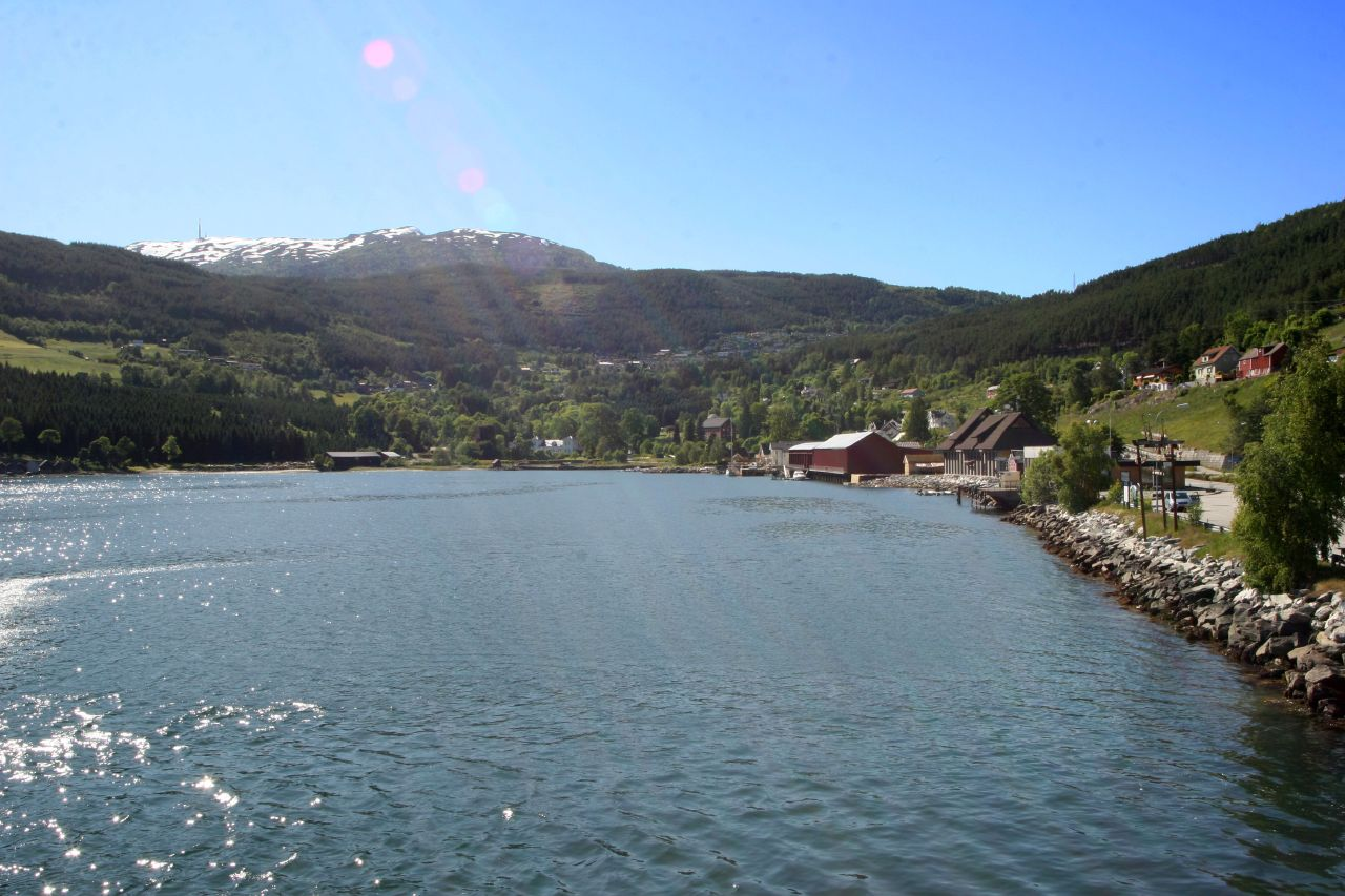 Kaupanger, med Kaupanger Hovedgård midt i biletet.